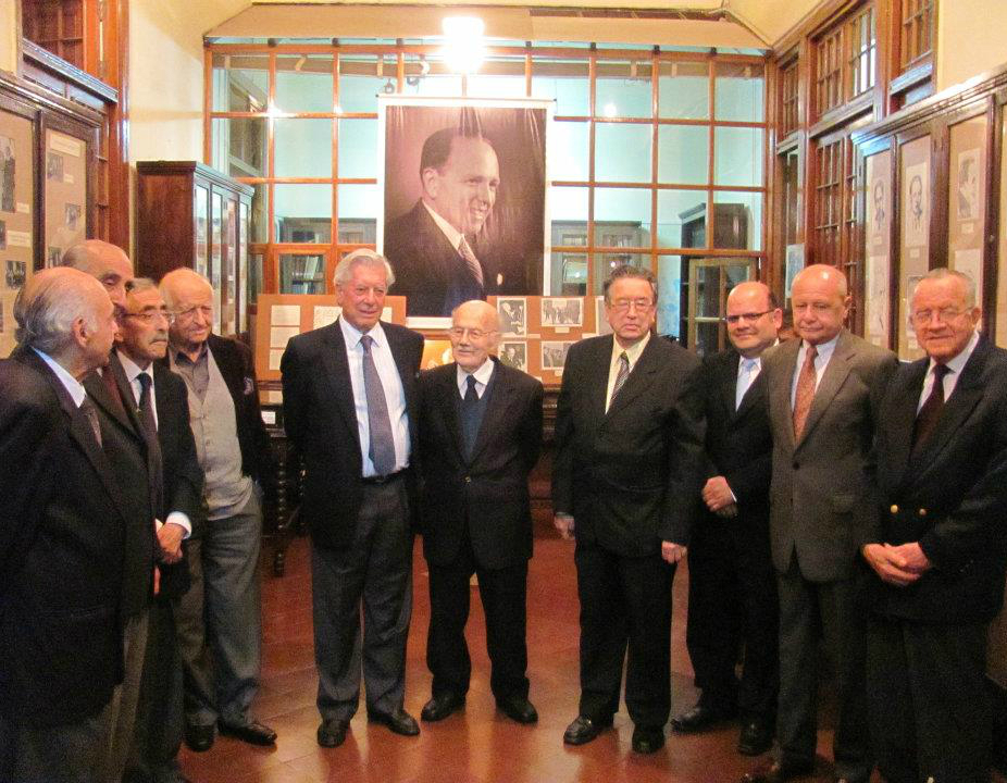 Instituto Raúl Porras Barrenechea Foto tomada por: Rocío Hilario, administradora del Instituto Raúl Porras Barrenechea.